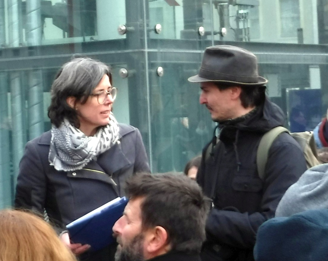 Manaf Halbouni im Gespräch mit Christiane Mennicke-Schwarz (Künstlerische Leiterin des Kulturhauses Dresden) auf dem Dresdner Neumarkt